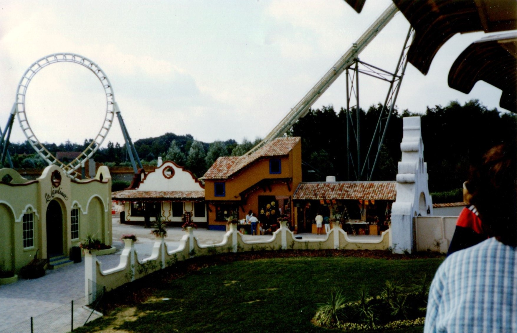 BellewaerdeBoomerang